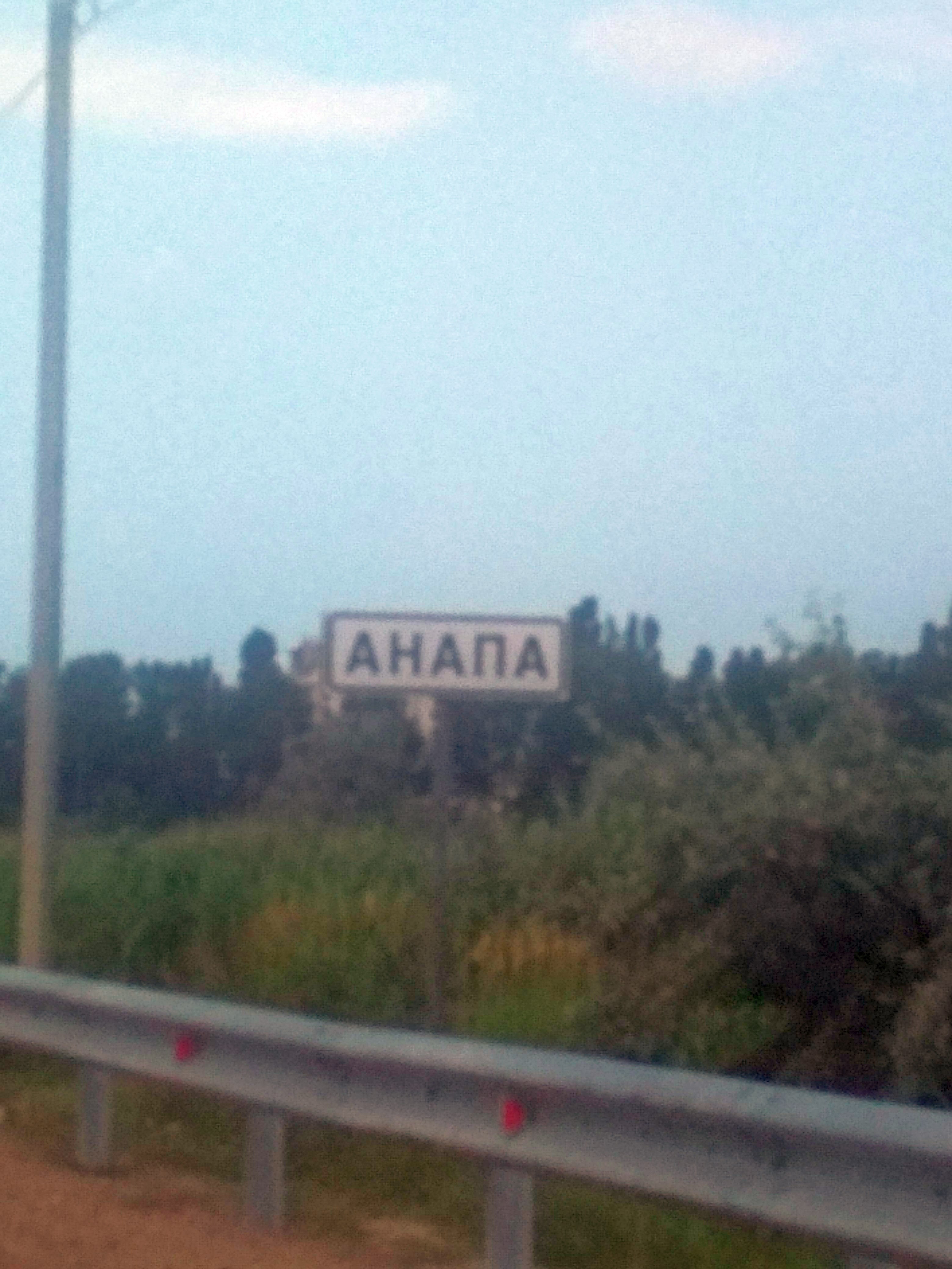 Нохчийн: Анапан хьаьрк